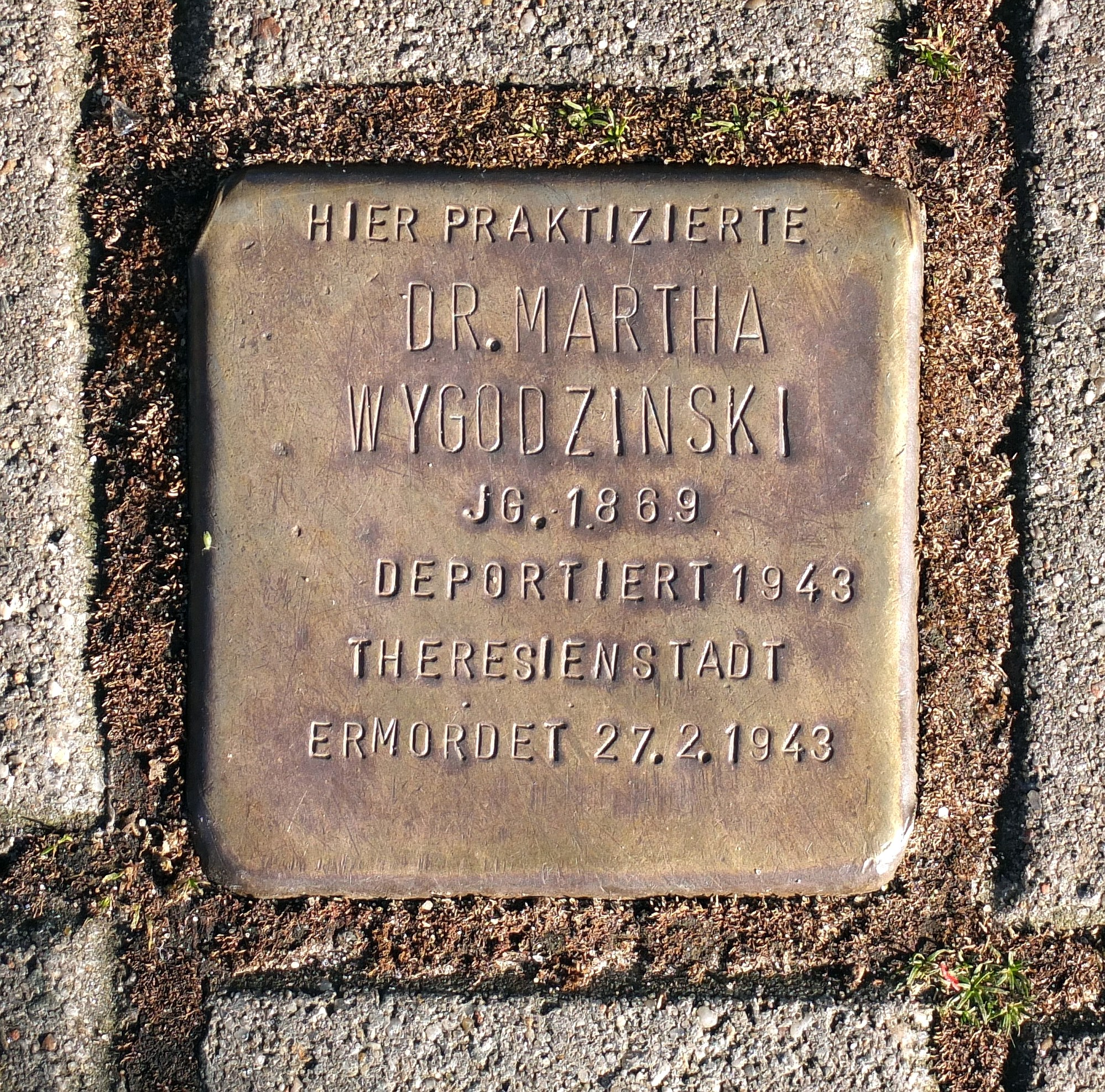 Stolperstein für Martha Wygodzinski vor dem Zugang zum Haus Alexanderstraße 25 in Berlin-Mitte